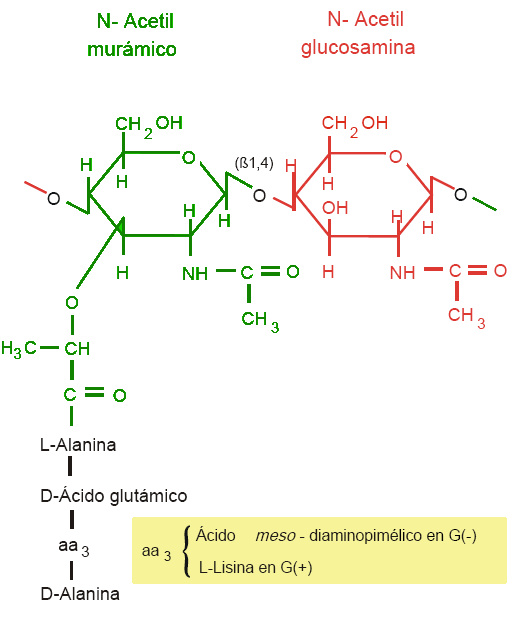 Estructura química del peptidoglucano, con sus variables Gram + y Gram